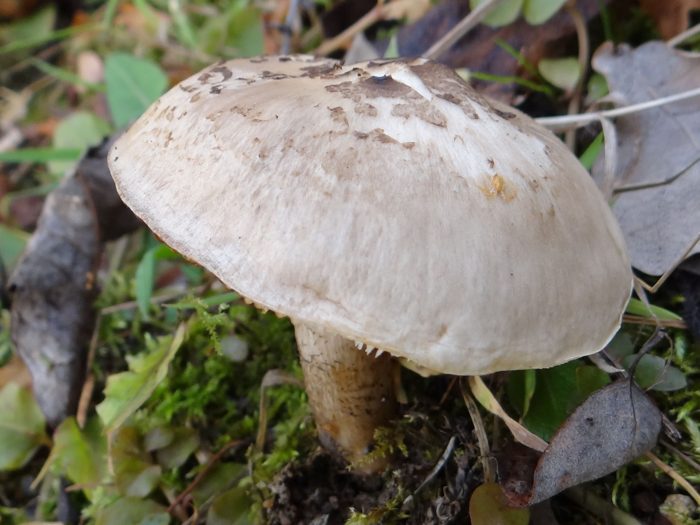 Pluteus petasatus (location: Poland)